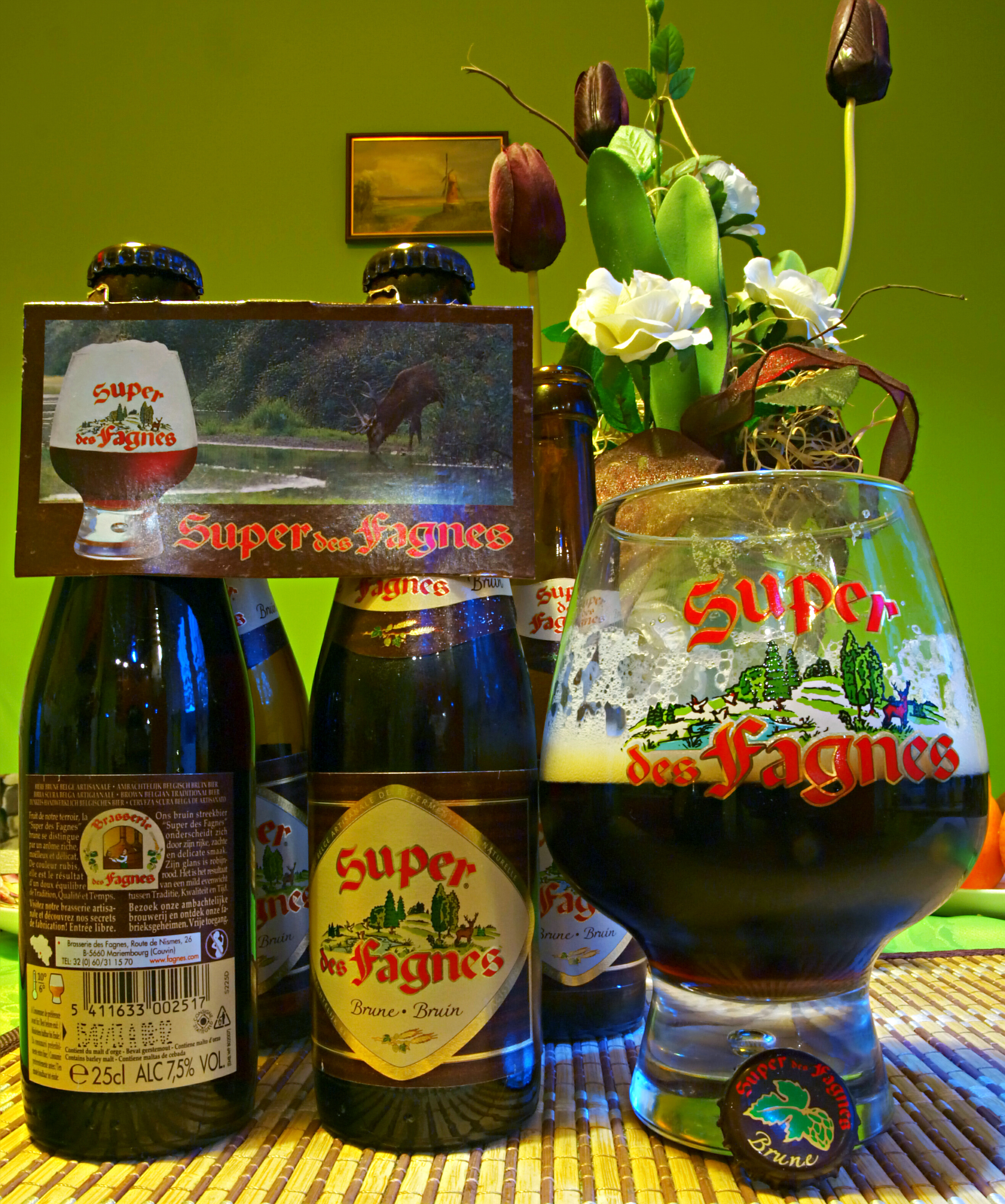 Piwo Belgijskie